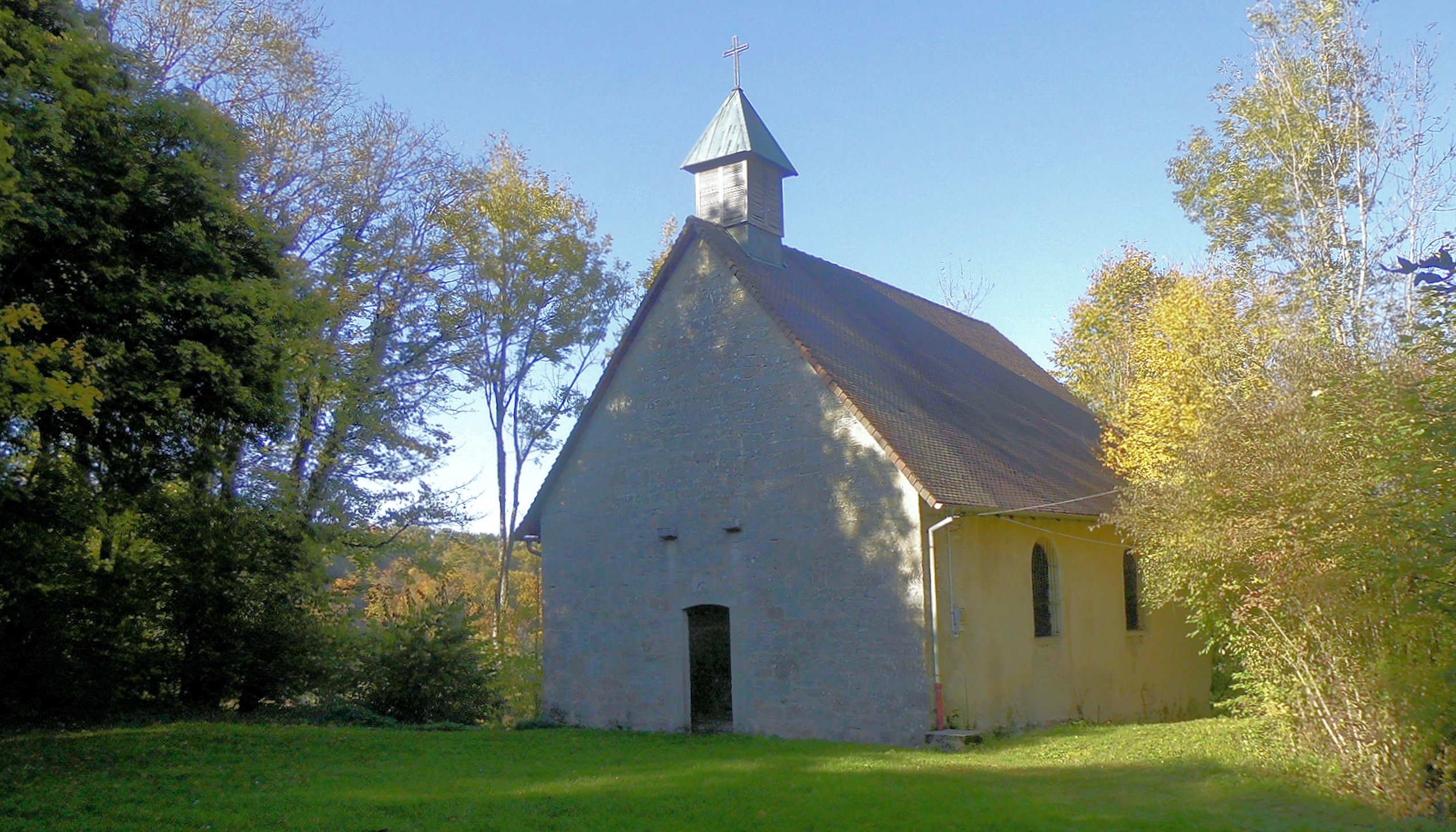 La chapelle de Saint-Ursin à Neuchâtel-Urtière